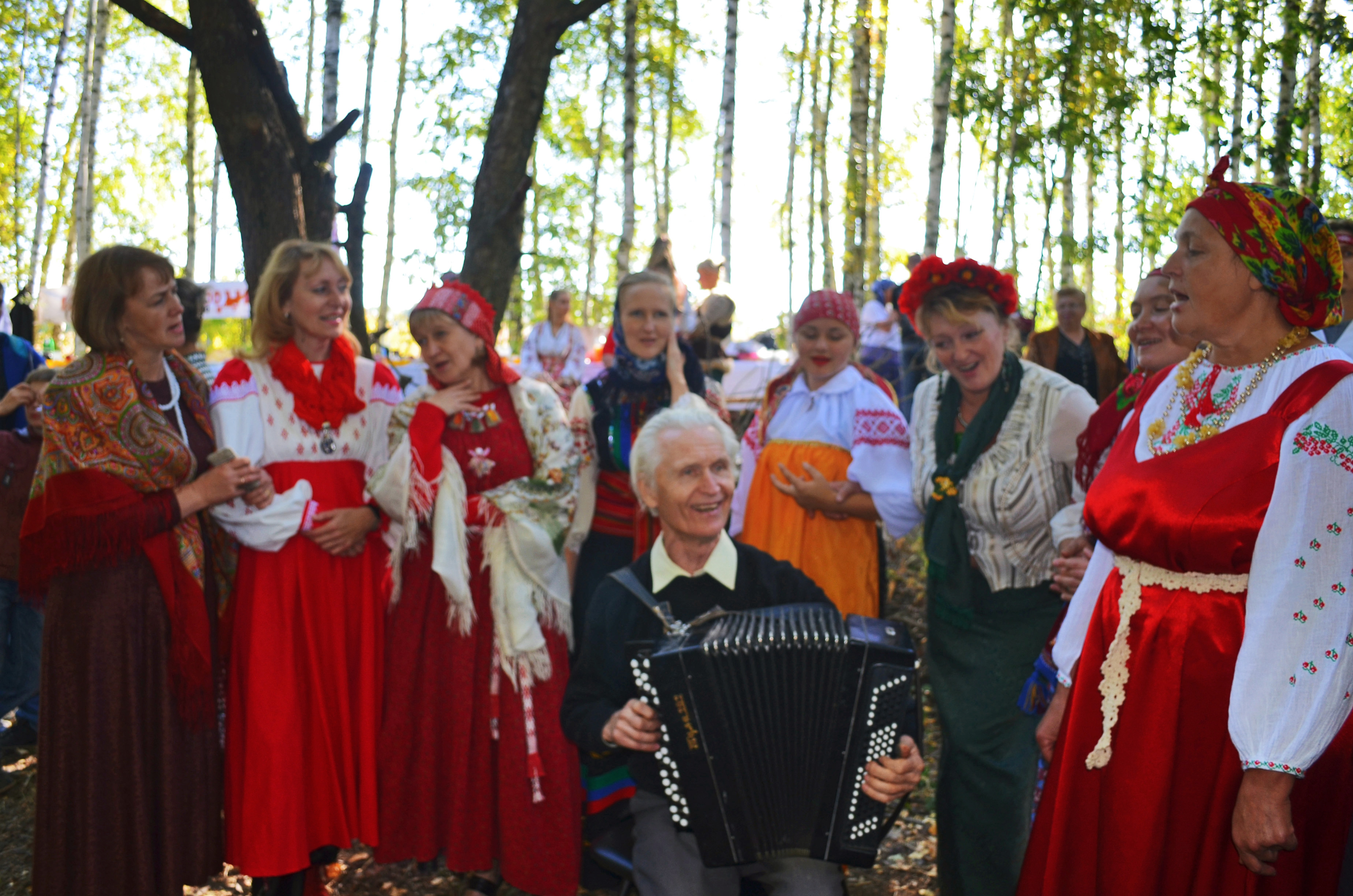 Праздник встречи осени (Осенины) в родовом экопоселении «Кореньские родники». Белгородская область, 2014.